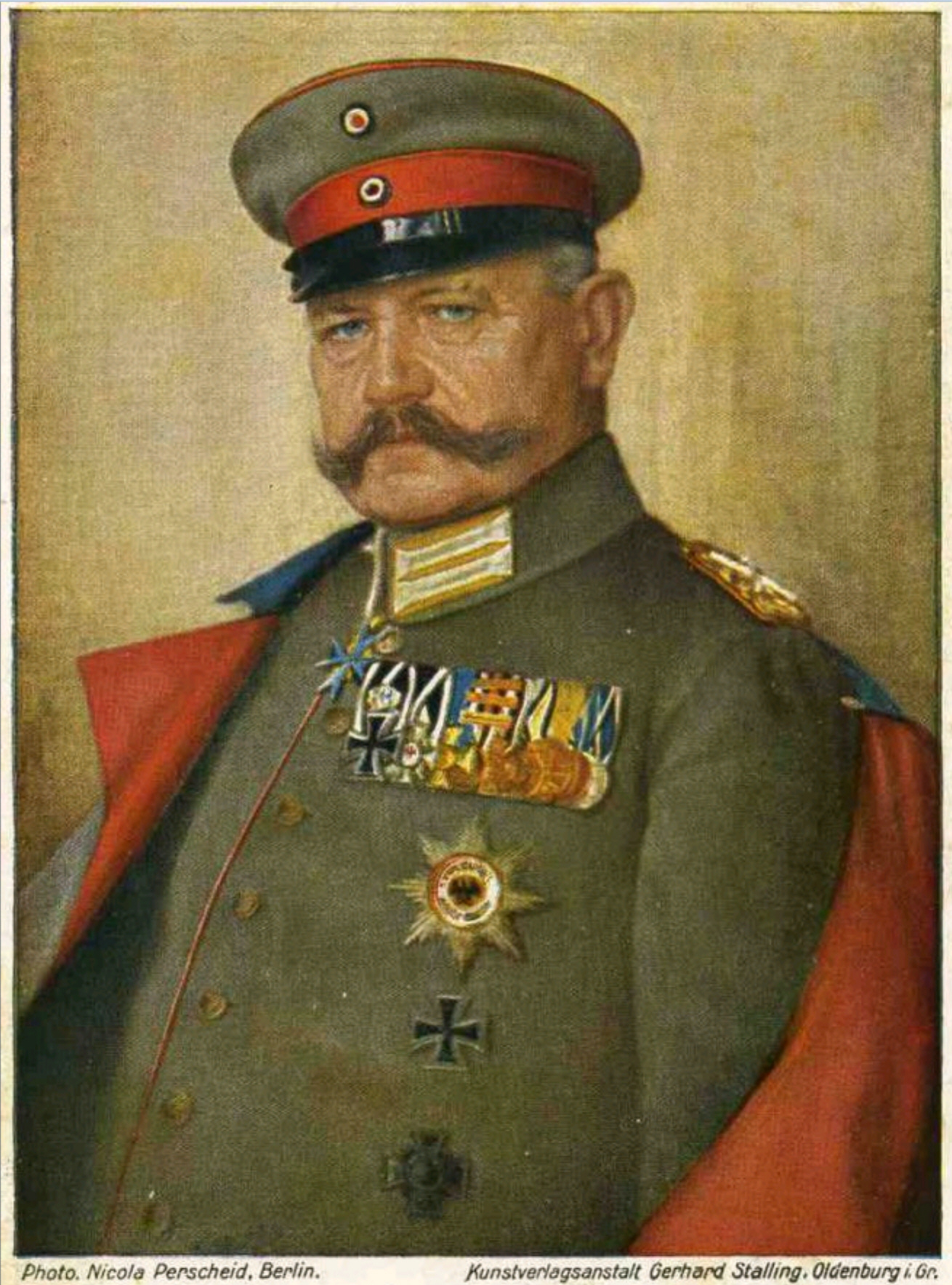 Paul von Hindenburg, Fotografie von Gemälde als Wohlfahrtspostkarte